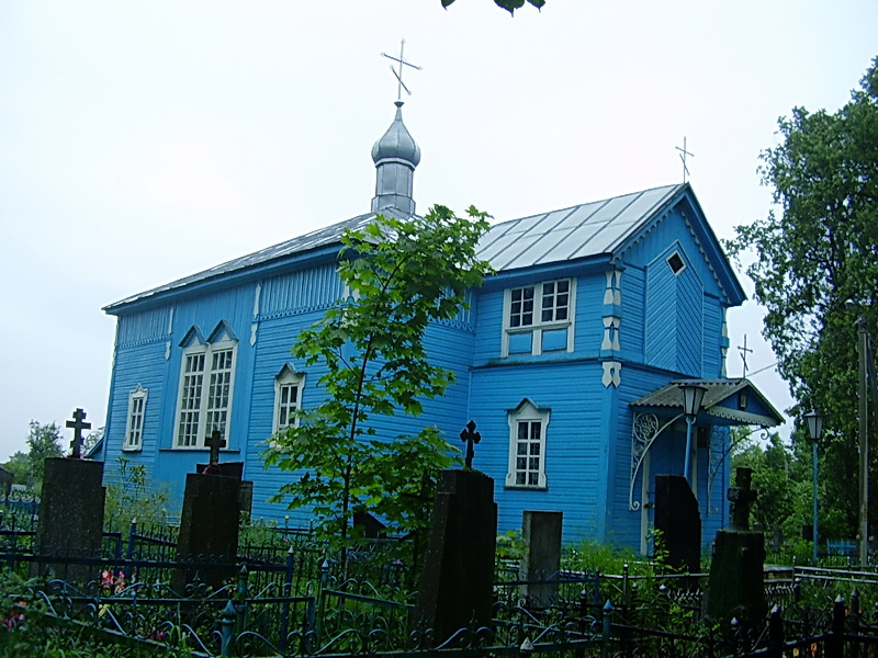 Клецк. Свята-Пакроўская царква